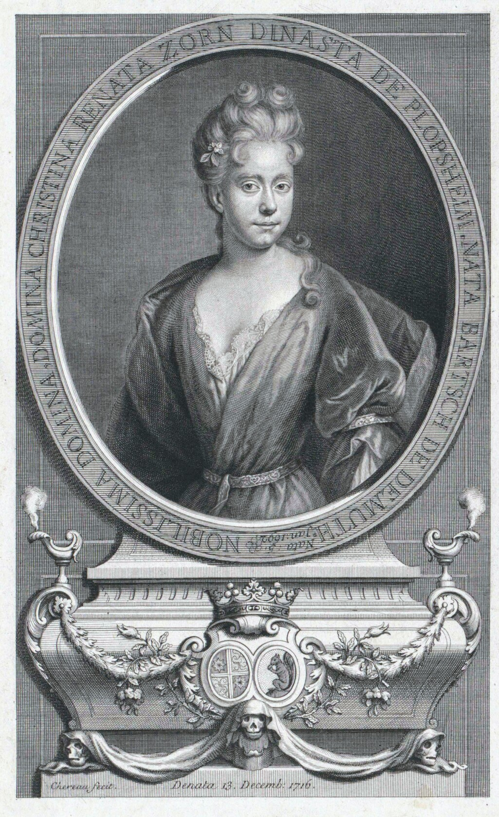 Portrait der Edlen Herrin, Frau Christina Renata Zorn, Erbherrin von Plobsheim, geborene Bartsch von Demuth (1692–1716)